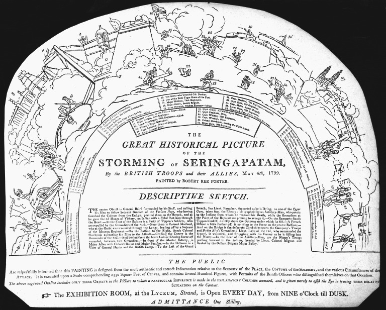 Storming